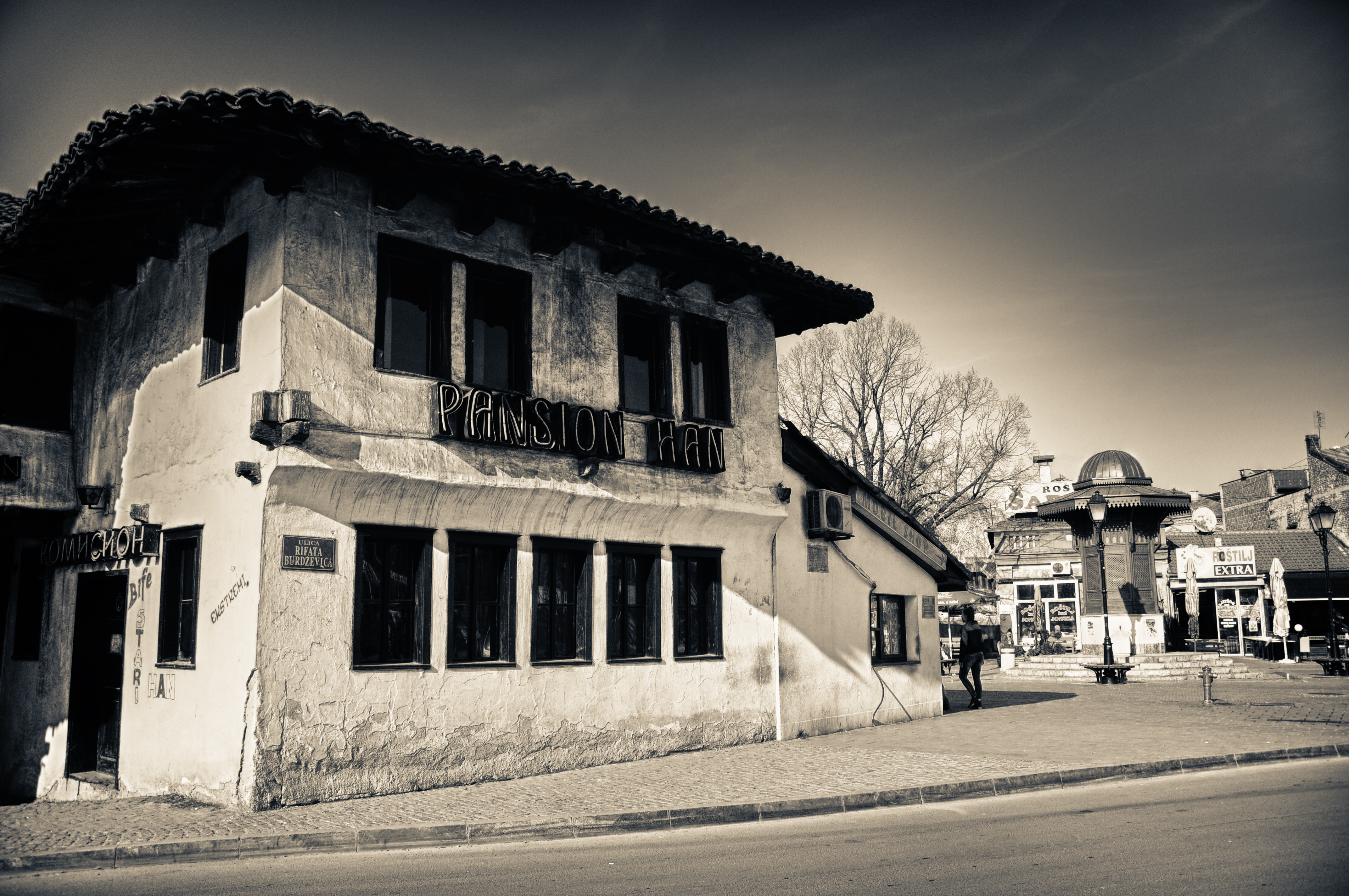 Amir-agin han